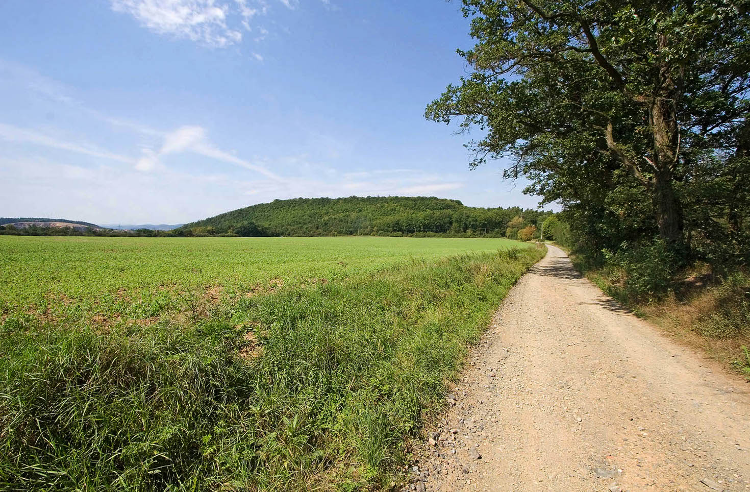 Pohled na keltské oppidum Závist u Zbraslavi od Lhotky